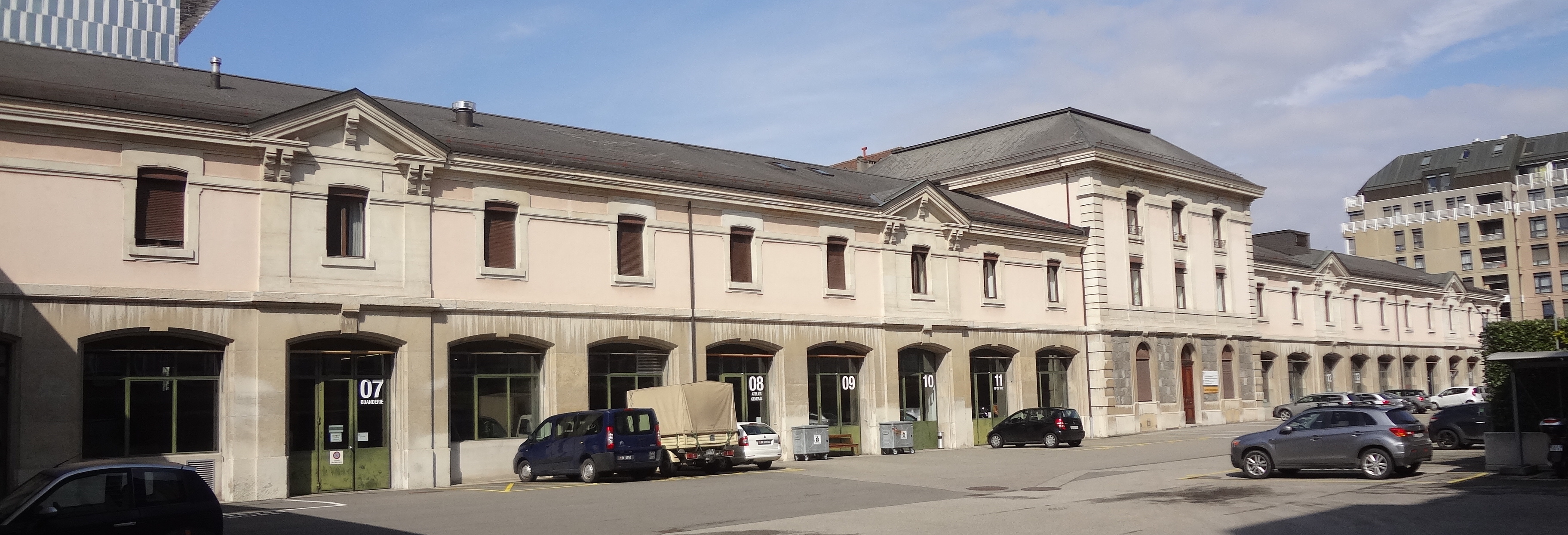 Arsenal de Plainpalais. Bâtiment de style néo-classique, classé, construit en 1875-1876 par John Camoletti. Façade arrière du bâtiment longeant la rue de l'École-de-Médecine.